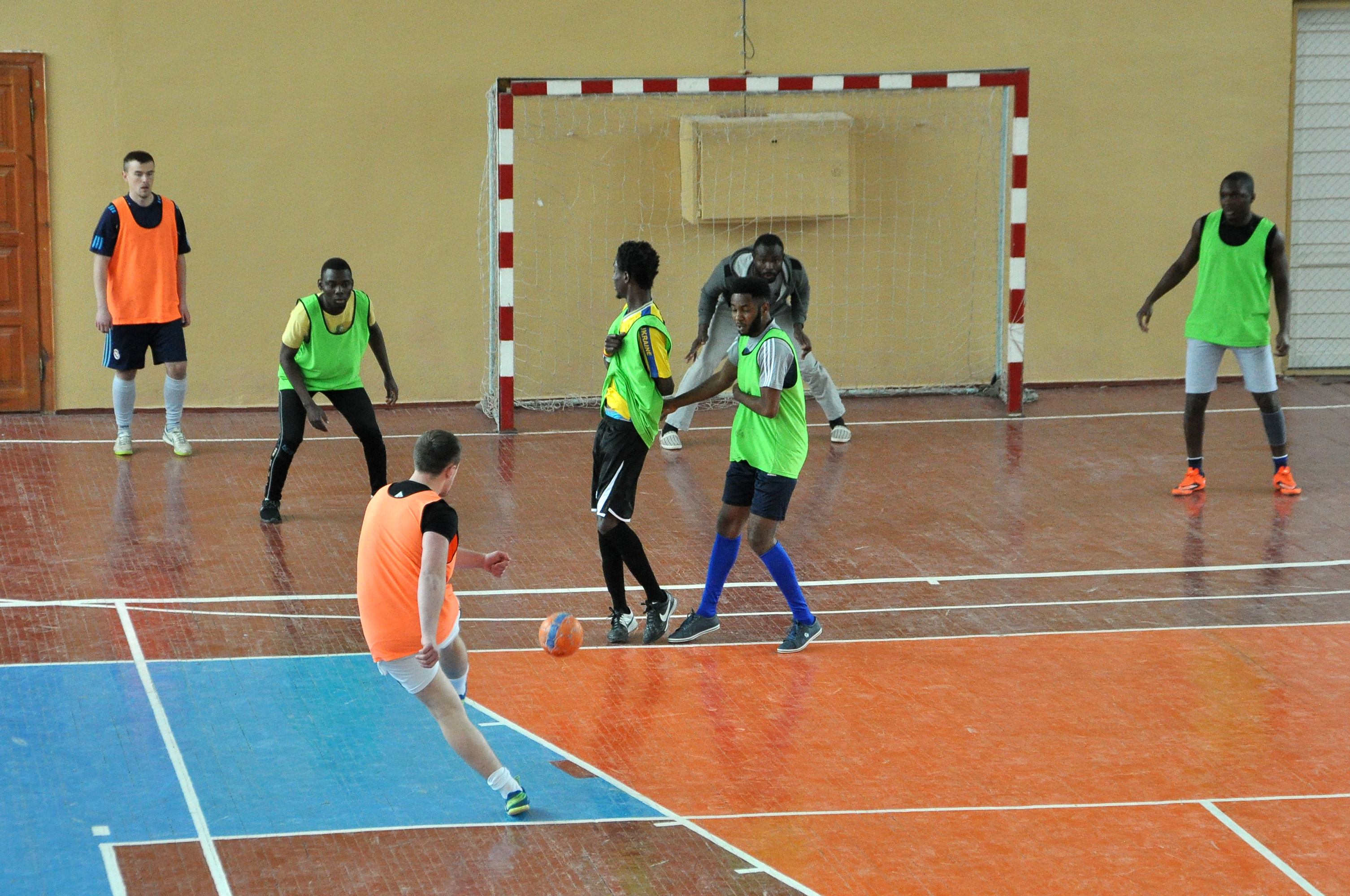 Міні-футбол «Ліга чемпіонів» Тернопільського державного медичного університету імені І. Я. Горбачевського. Півфінальні та фінальний поєдинки 26 квітня 2016 року.